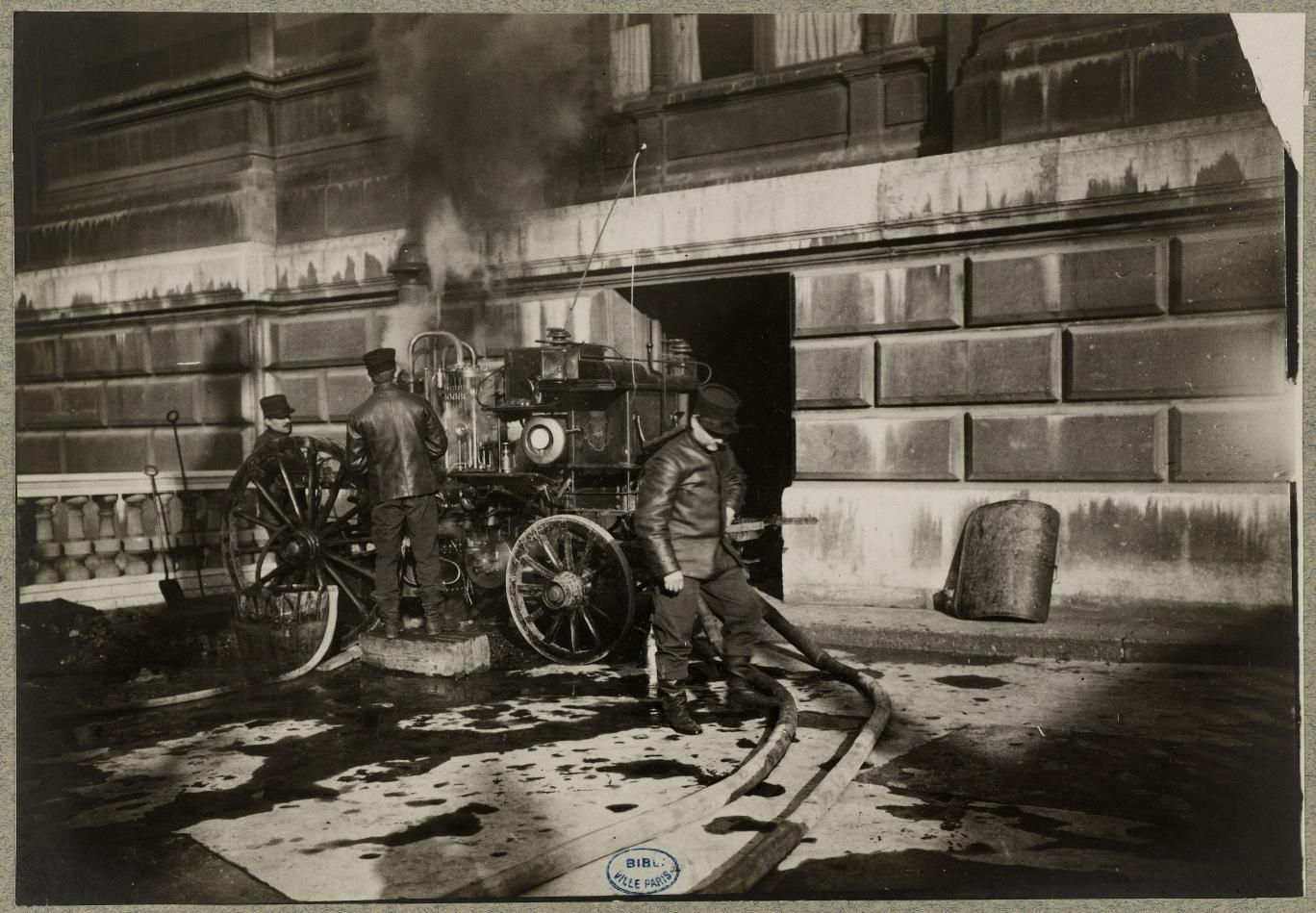 Les pompiers épuisent l'eau dans le sous-sol de l'Opéra de Paris lors de la crue de la Seine en 1910